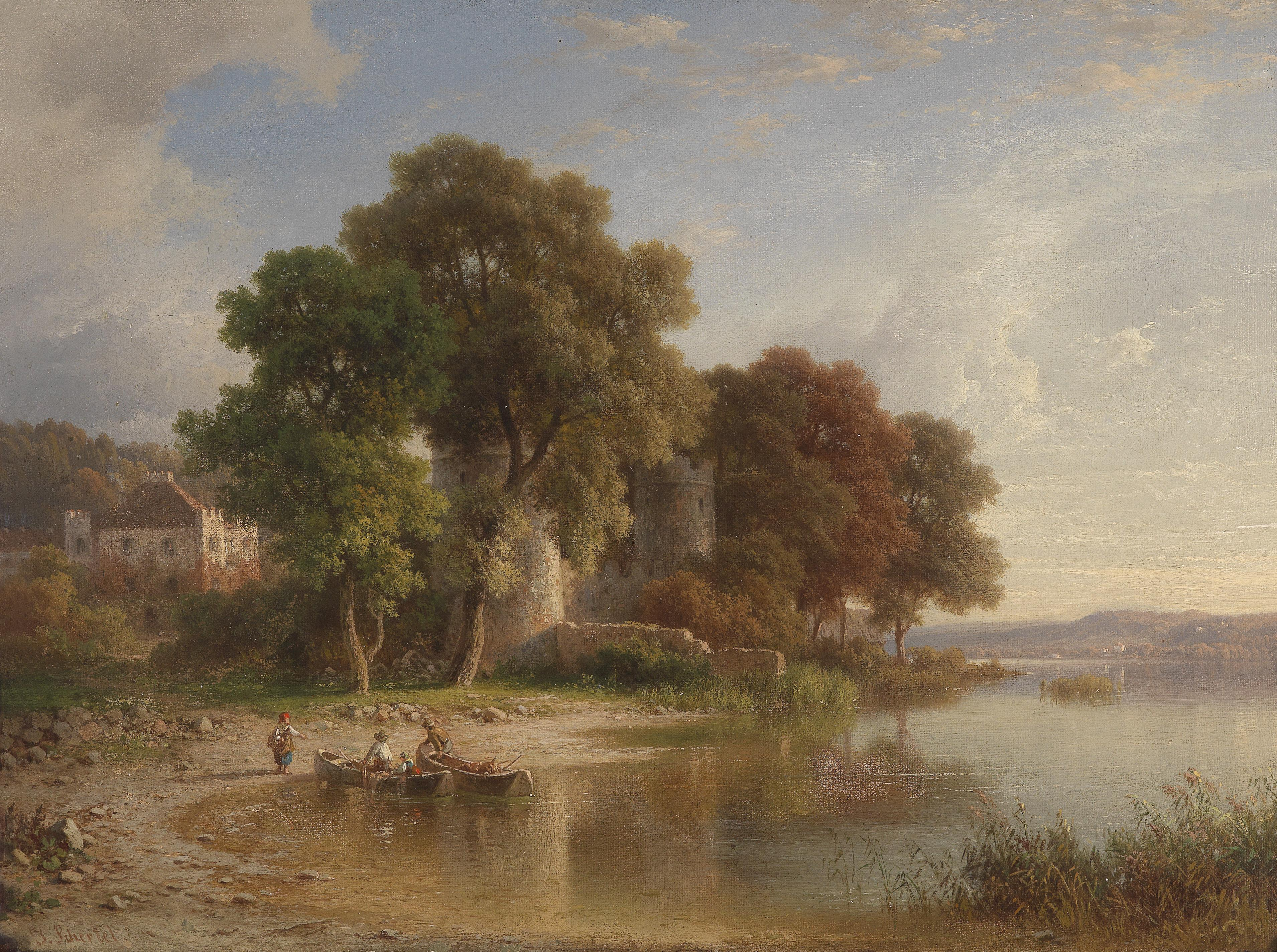 Schloss Possenhofen am Starnberger See, signiert J. Schertel, Öl auf Leinwand, 41,5 x 56 cm